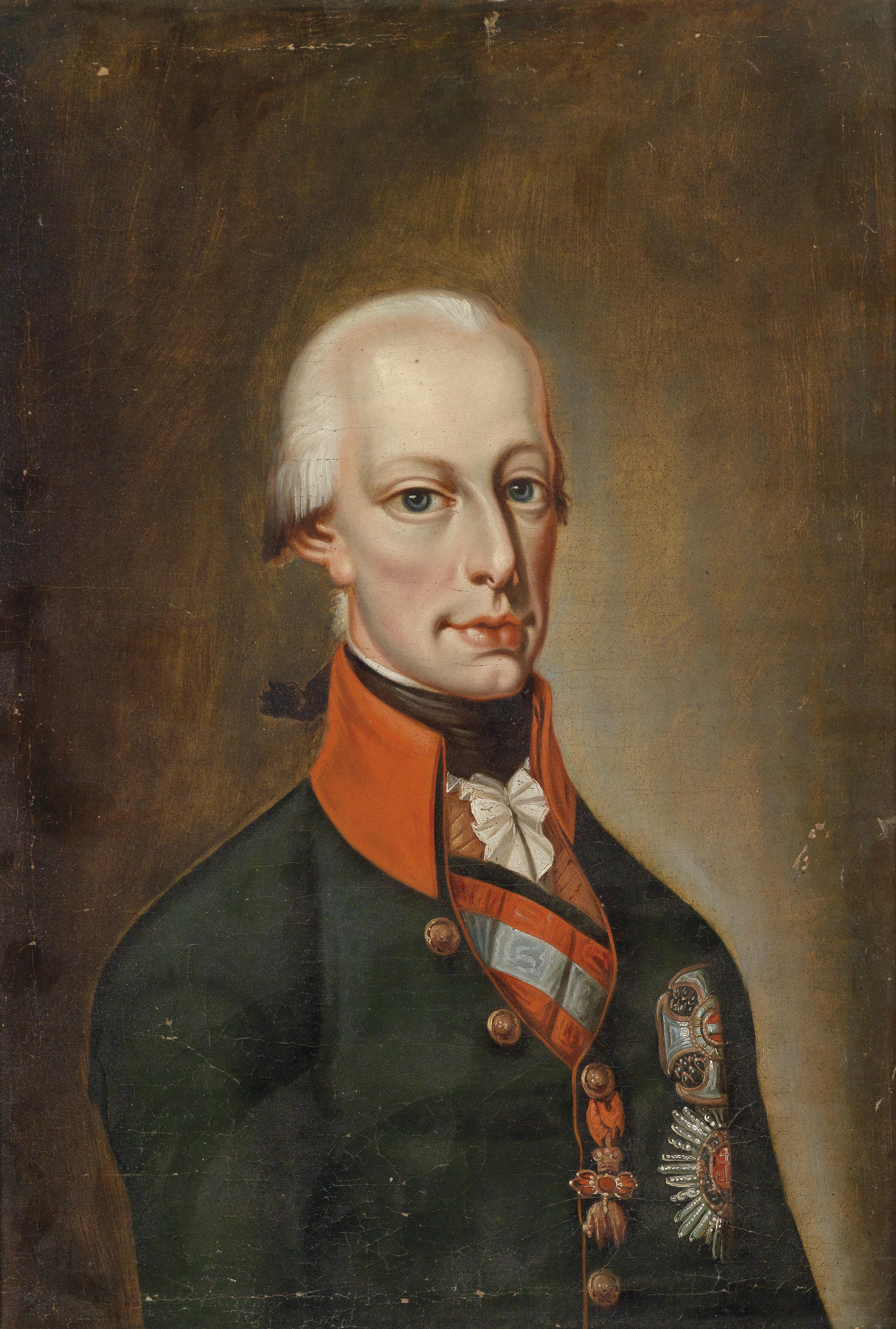 Bildnis des röm.-dt. Kaisers Franz II.